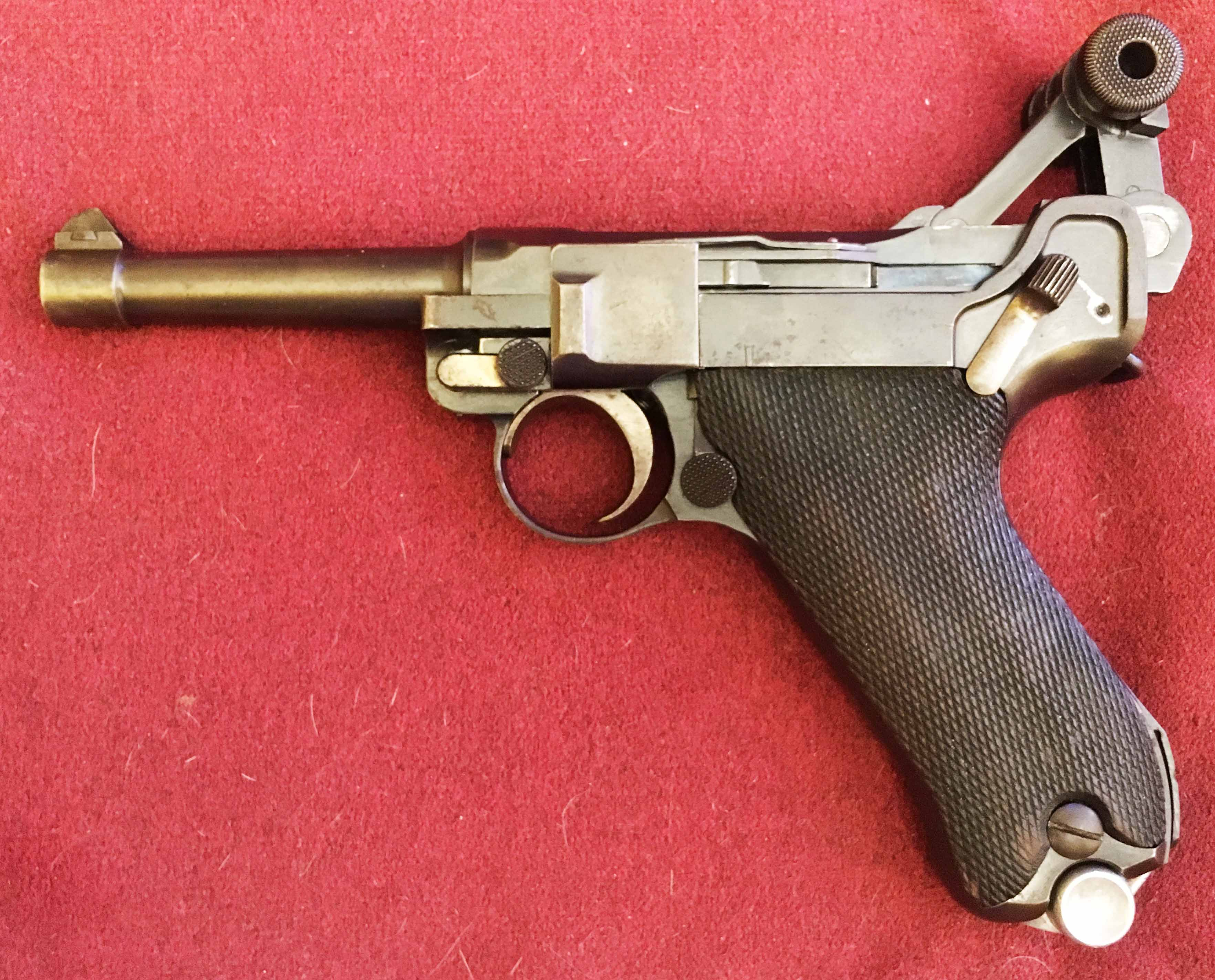 P08 mechanism